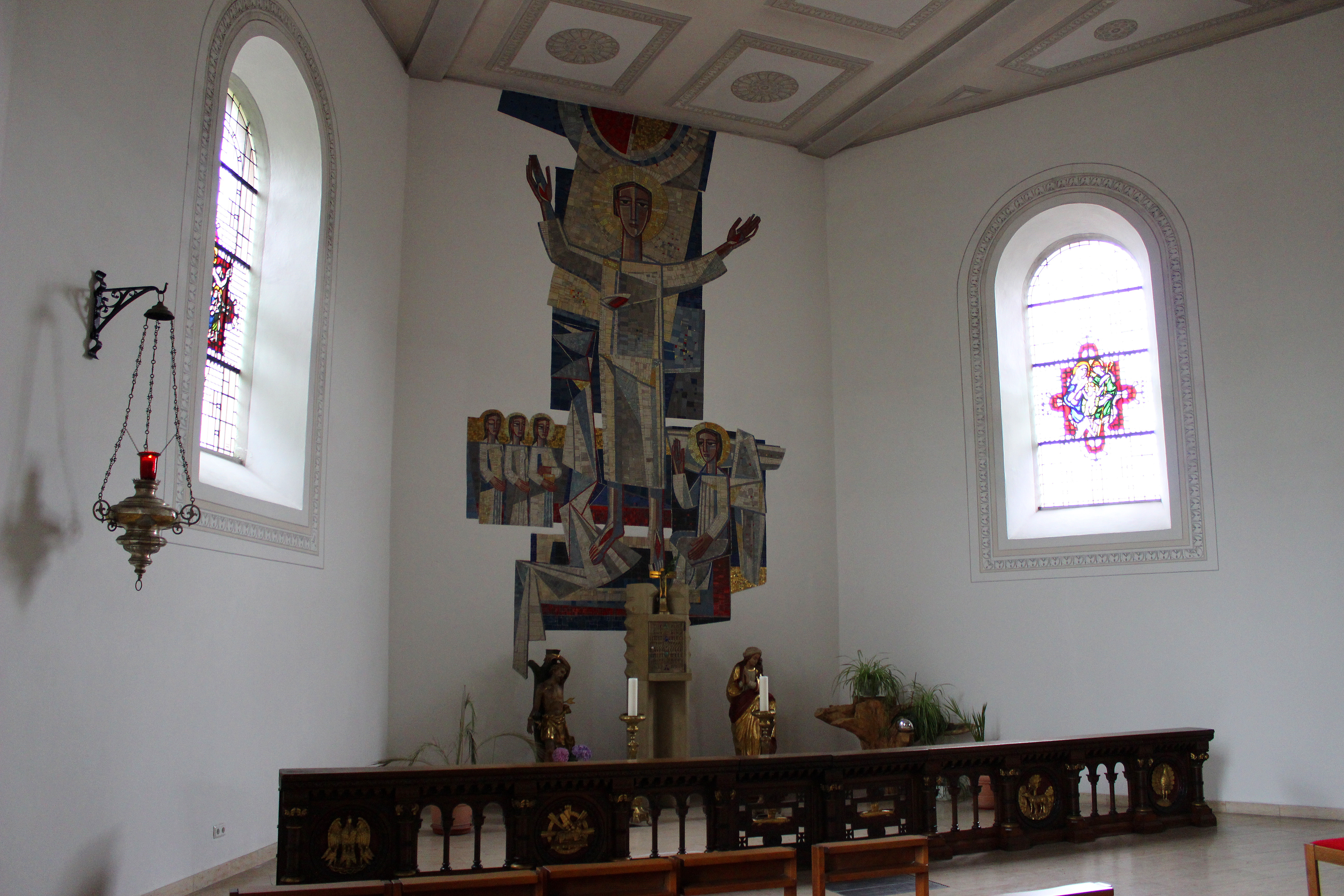 Sakramentskapelle in der katholischen Pfarrkirche St. Sebastian in Eppelborn, Landkreis Neunkirchen, Saarland